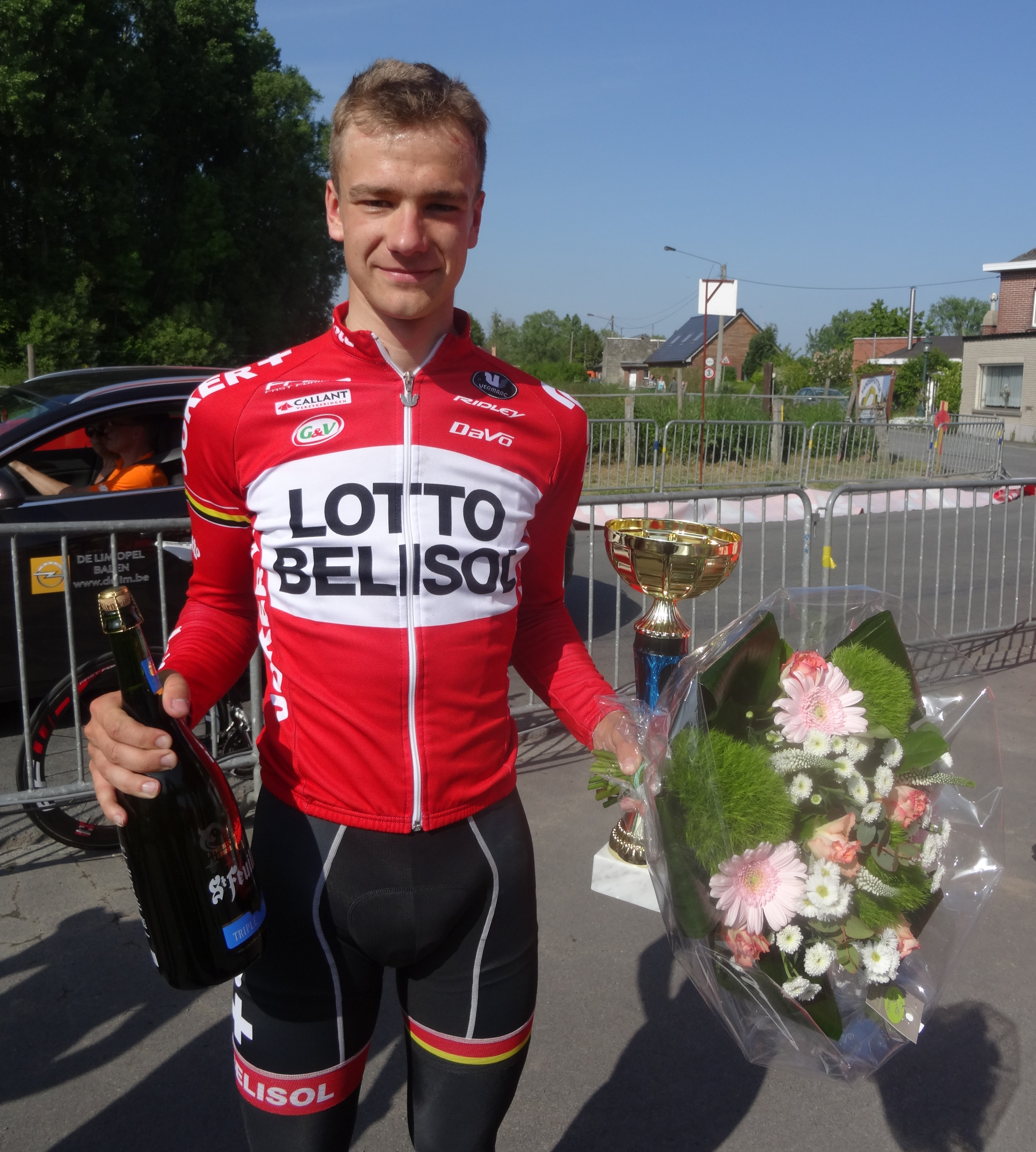 Grand Prix Criquielion 2014, Deux-Acren. Depicted person: Kevin Deltombe Depicted team: Lotto-Belisol U23